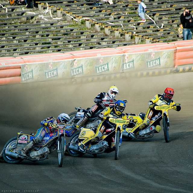 PSŻ Poznań vs Polonia Bydgoszcz